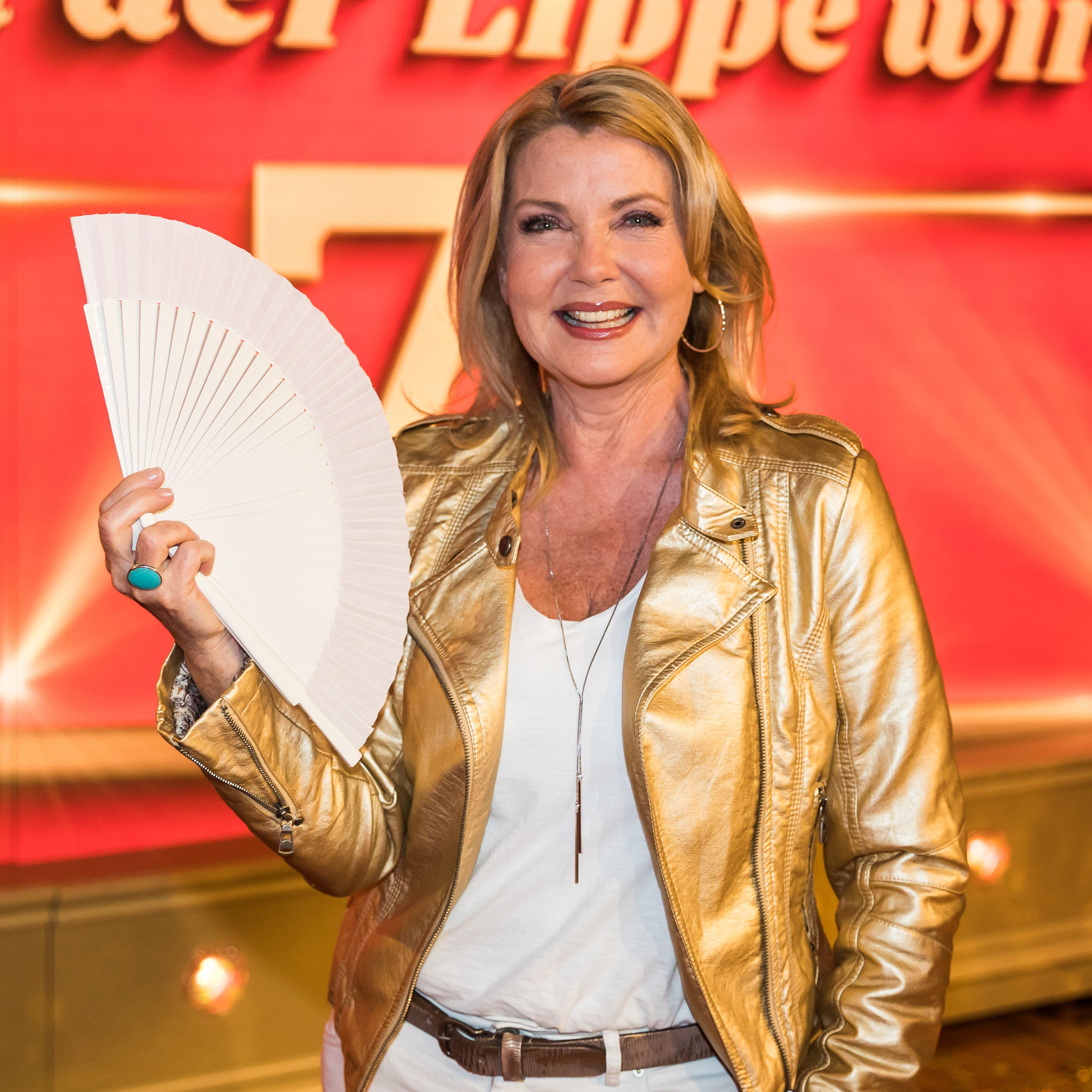 „Mensch Jürgen - von der Lippe wird 70“. Die Geburtstagsshow wird präsentiert von Jörg Pilawa. Fototermin nach Ende der Aufzeichnung. Sendetermin: 9. Juni 2018 um 20.15 Uhr im Ersten Foto: Jane Comerford